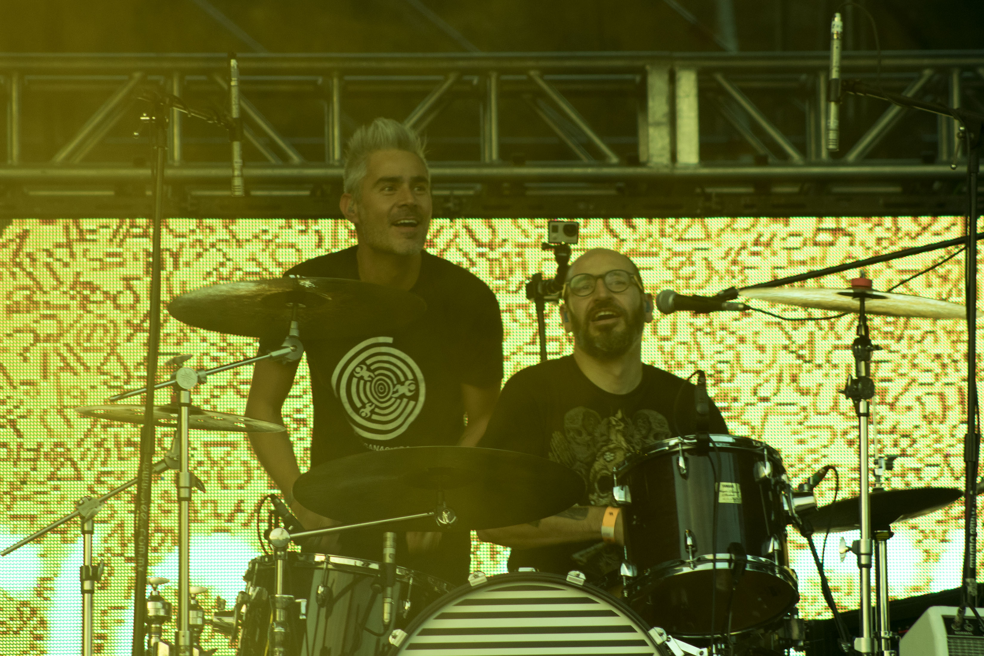 Sábado 12 de noviembre de 2017. Como parte de las actividades de la Semana de las Juventudes del 2017, este sábado 12 de noviembre se desarrolló un segundo concierto masivo en la plancha del Zócalo capitalino. Las bandas que se presentaron en esta ocasión fueron: Marcelo Viejo, Charlie Rodd, Ely Guerra, Dorian, Chetes, La Gusana Ciega, División Minúscula, El Tri y Fatboy Slim. Fotografía: Carlos Luna / Secretaría de Cultura CDMX